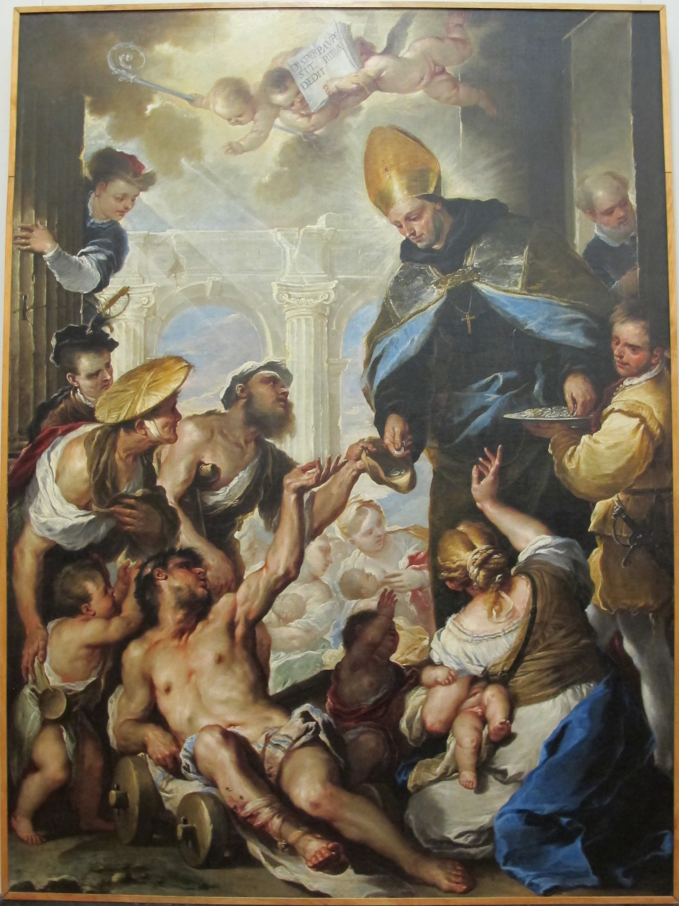 Galleria Napoletana (Museo di Capodimonte)